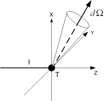 Particle differential scattering